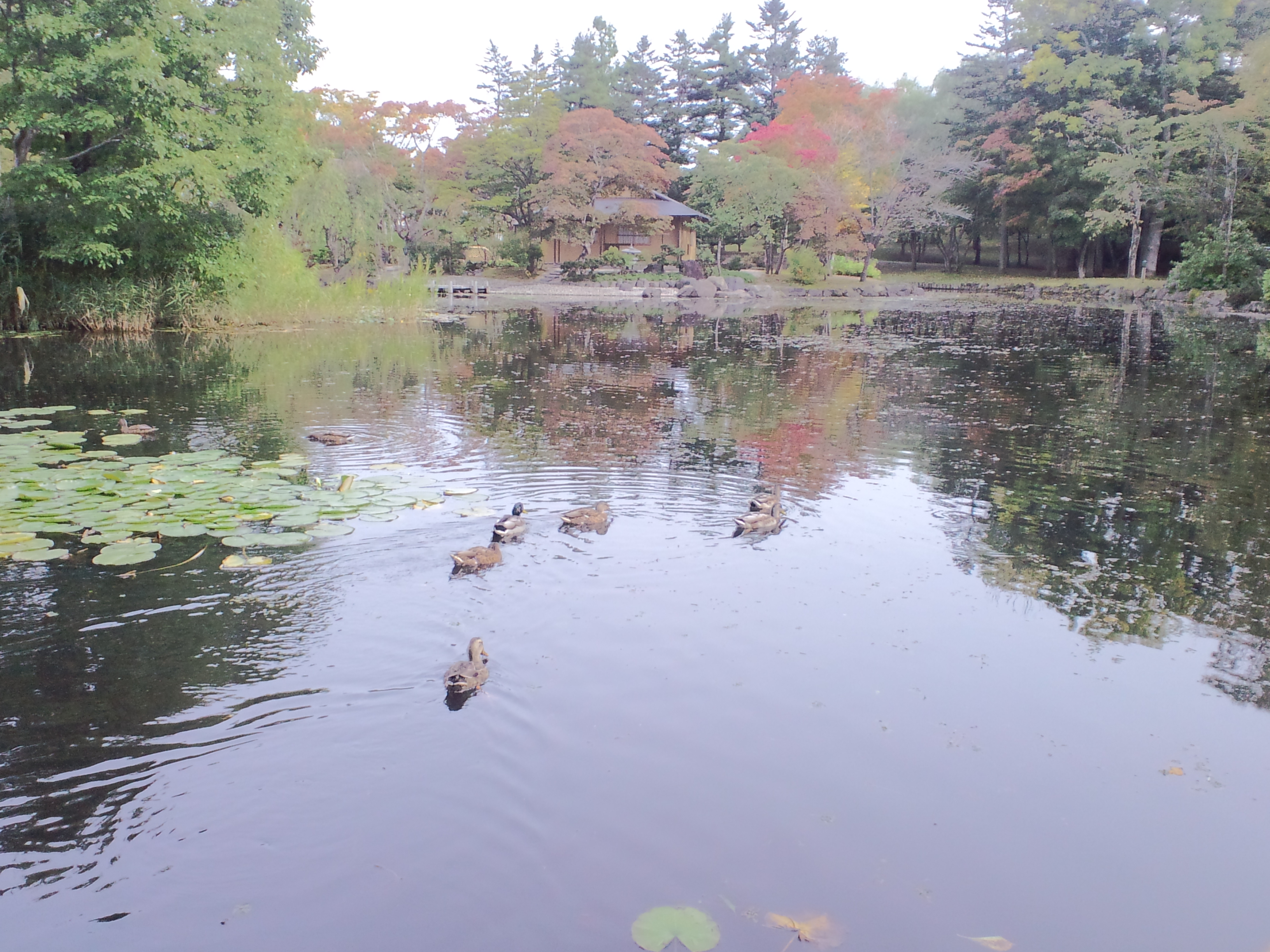 玉泉館跡地公園の鴨の群れ